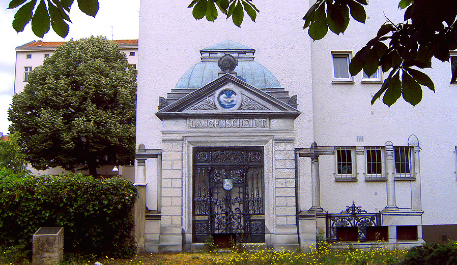 Mausoelum Gustav Langenscheidt Fassadenmalerei am Originalstandort auf Alter St.-Matthäus-Kirchhof mit Gedenkstein der Familie links. Projekt von EFEU e.V. 2008. Foto Ludger Wekenborg (StMatthaeus)